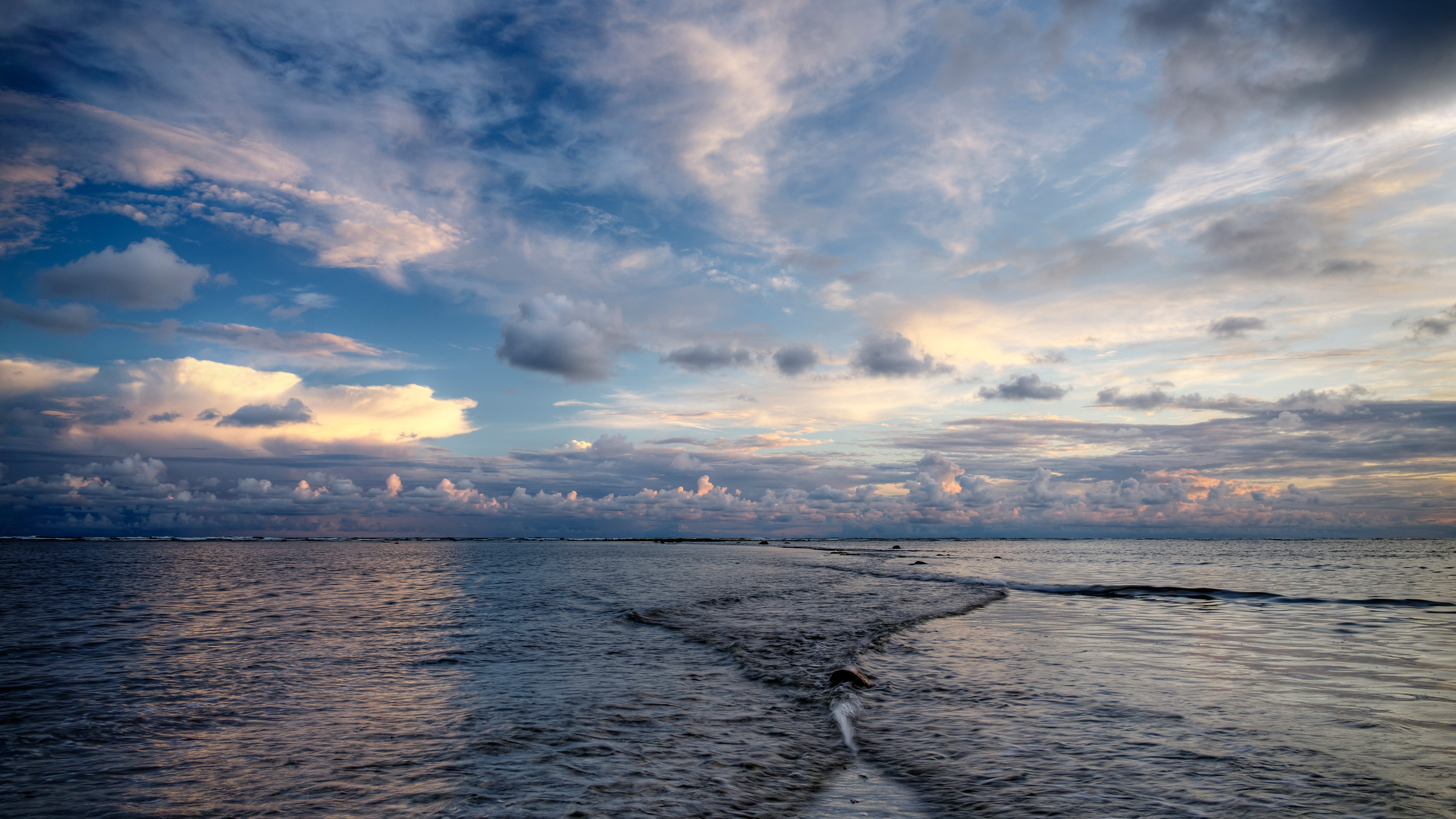 Karala rand, Saaremaa